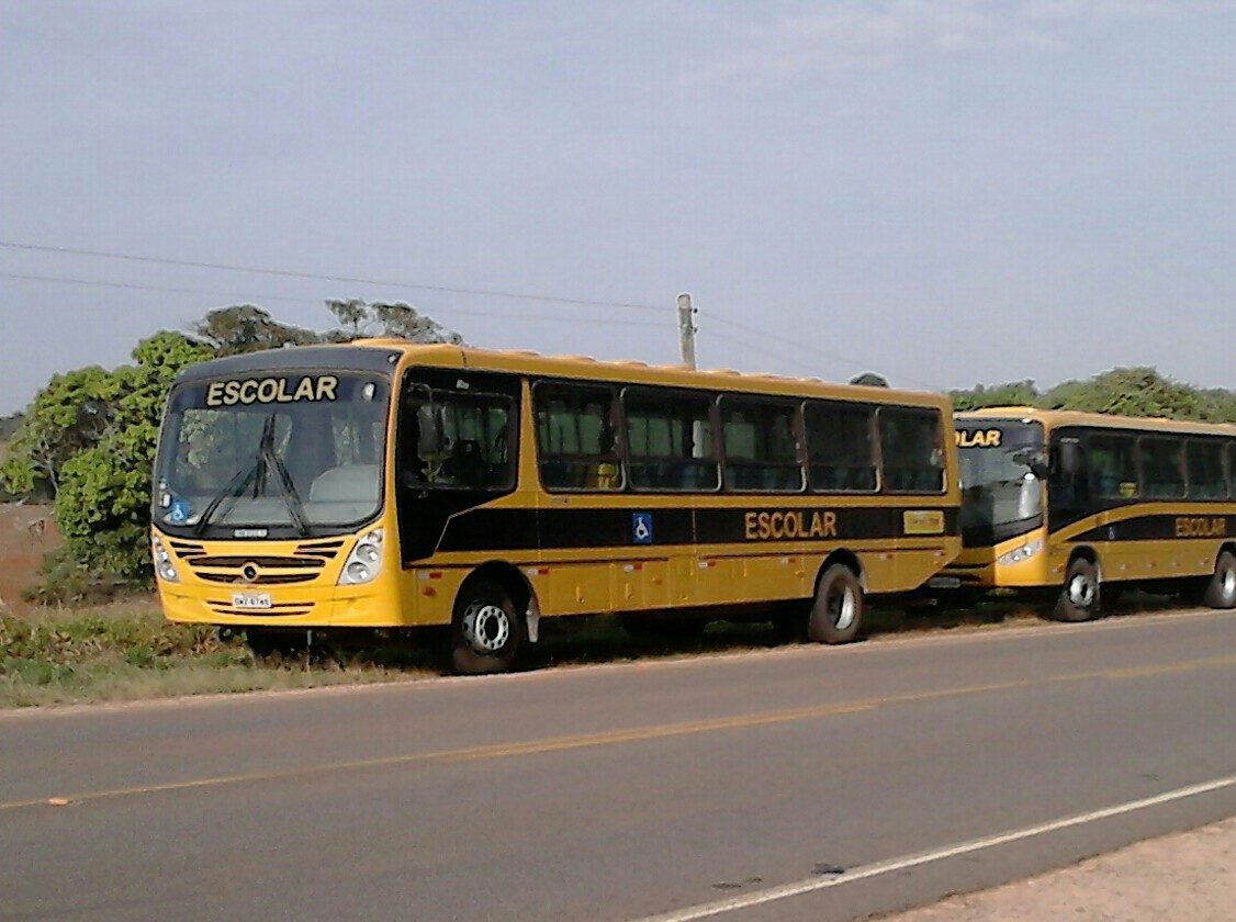 Ônibus Escolar do programa Caminhos da Escola da prefeitura de Divisa Nova, Minas Gerais, Brasil.